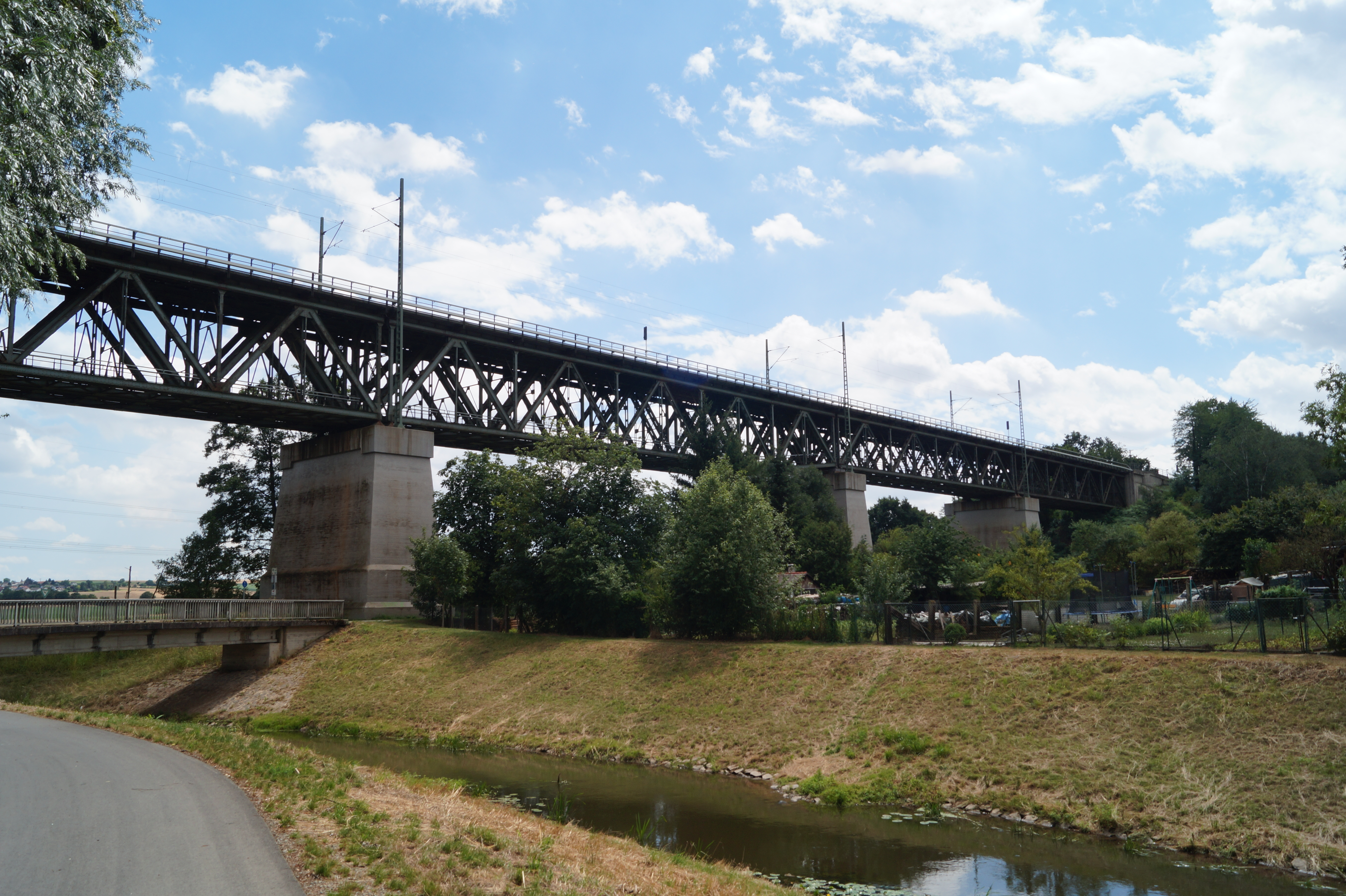 Viadukt der Bahnstrecke Hanau-Friedberg in Assenheim, Ansicht von Norden